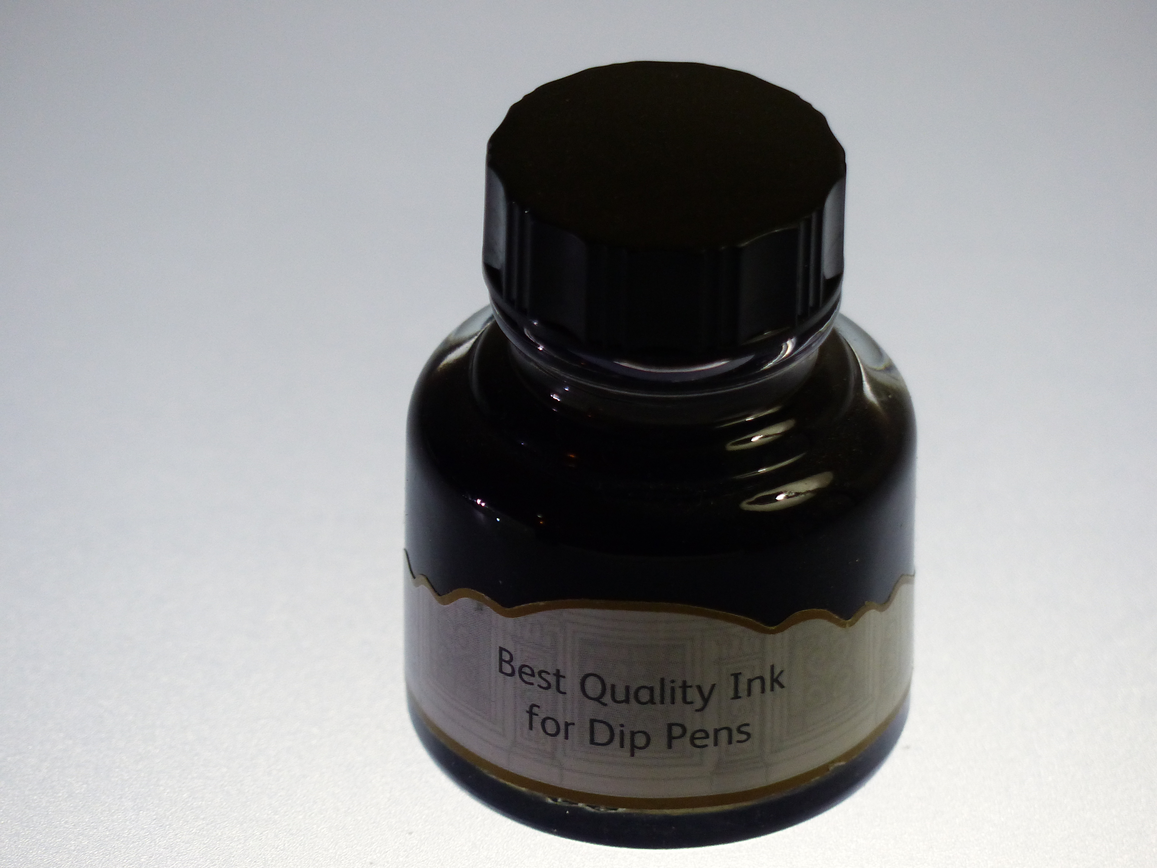 Bote de tinta